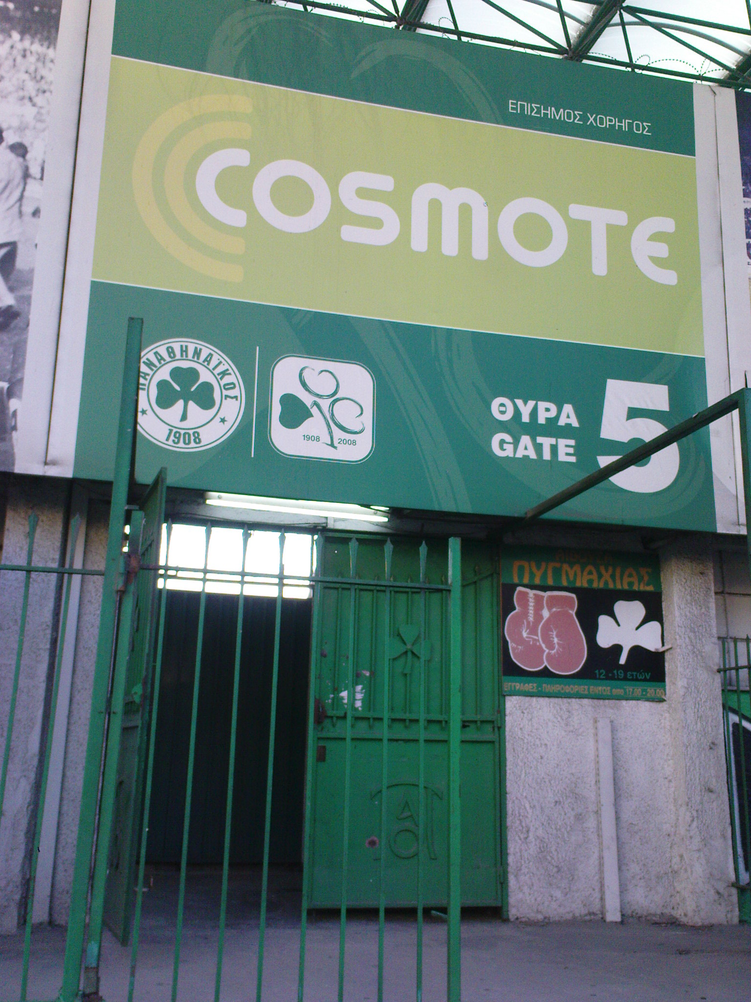 Η είσοδος του γυμναστηρίου της πυγμαχίας στο γήπεδο της Λεωφόρου Αλεξάνδρας